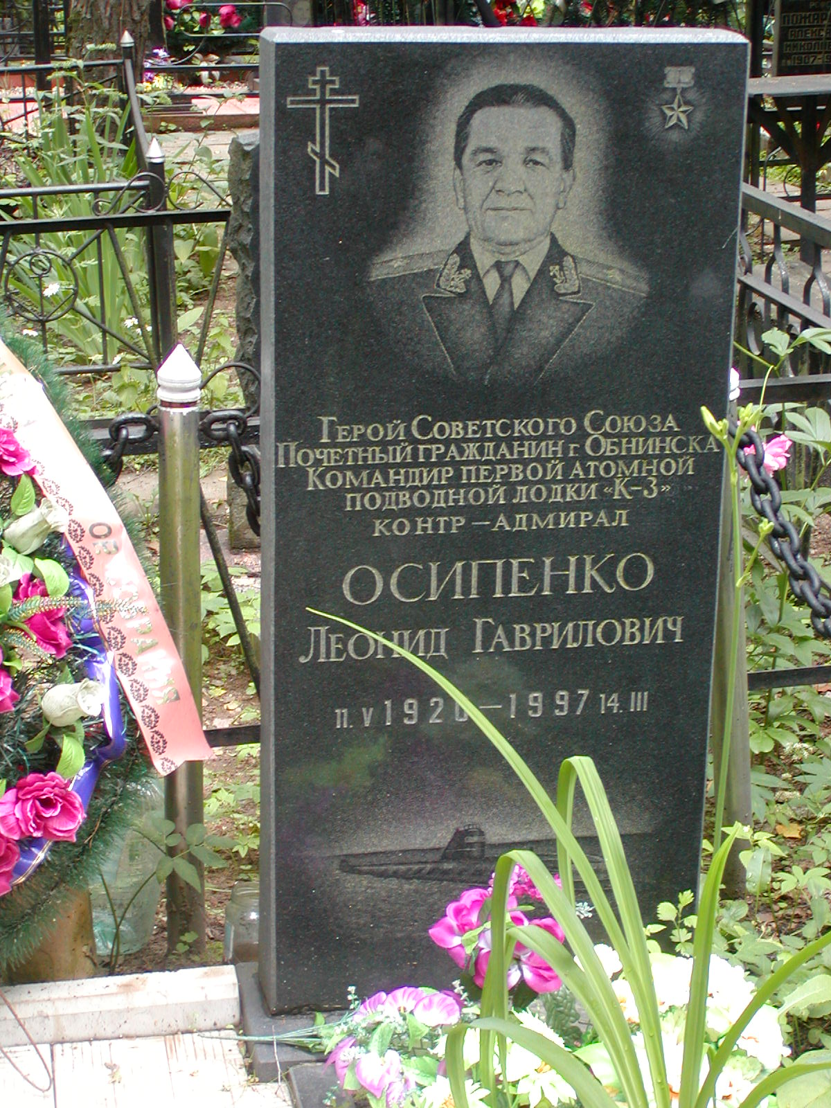 Надгробный памятник Леониду Гавриловичу Осипенко на Кончаловском кладбище в Обнинске